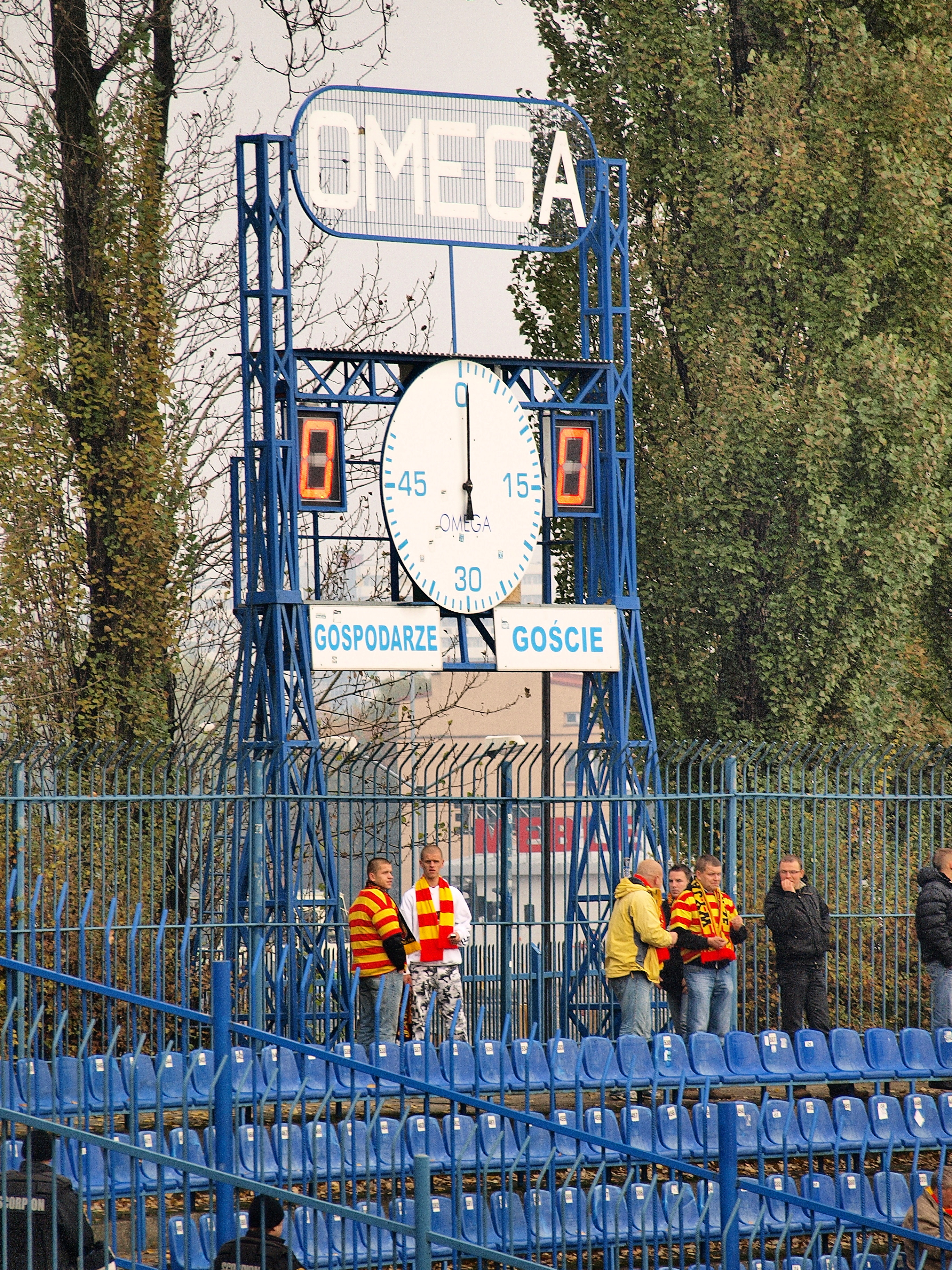 Chronometr Omega (z 1939 roku) na stadionie Ruchu Chorzów